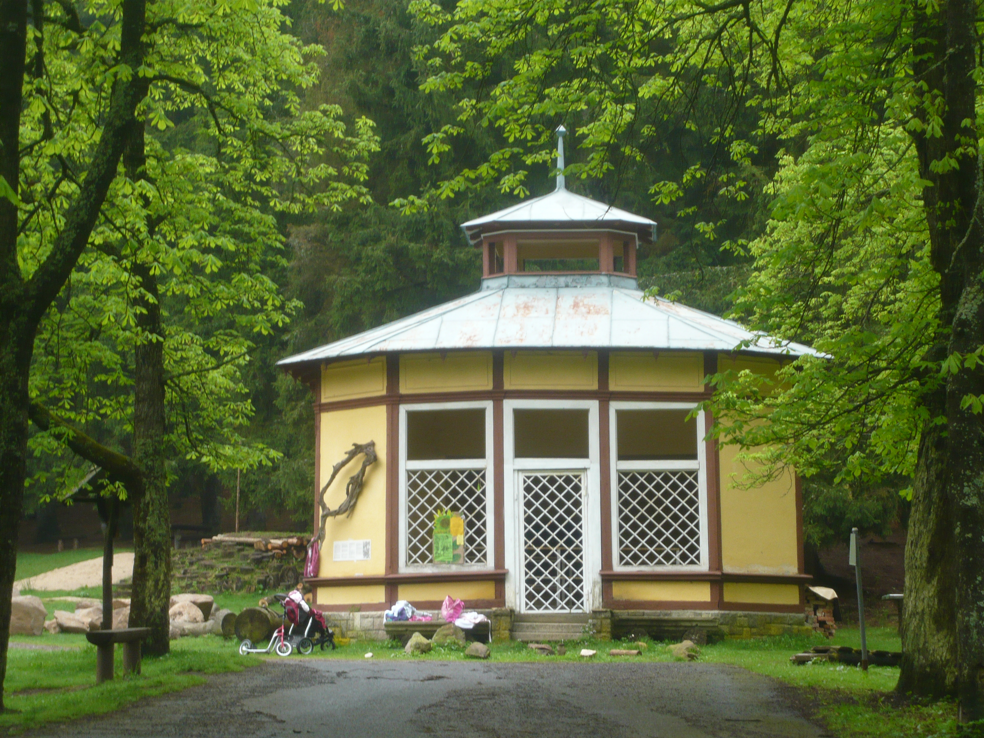 Prelátův pramen, Mariánské Lázně